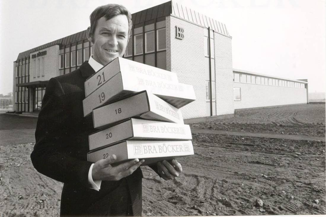 Rolf Janson framför Bra Böckers nybyggda förlagshus i Höganäs 1967. Publicerad med årtal och fotografens namn i medlemsbladet I Alf Henriksons sällskap 2017:2 (okt) s. 13 (medlemstidning för Alf Henrikson-sällskapet).